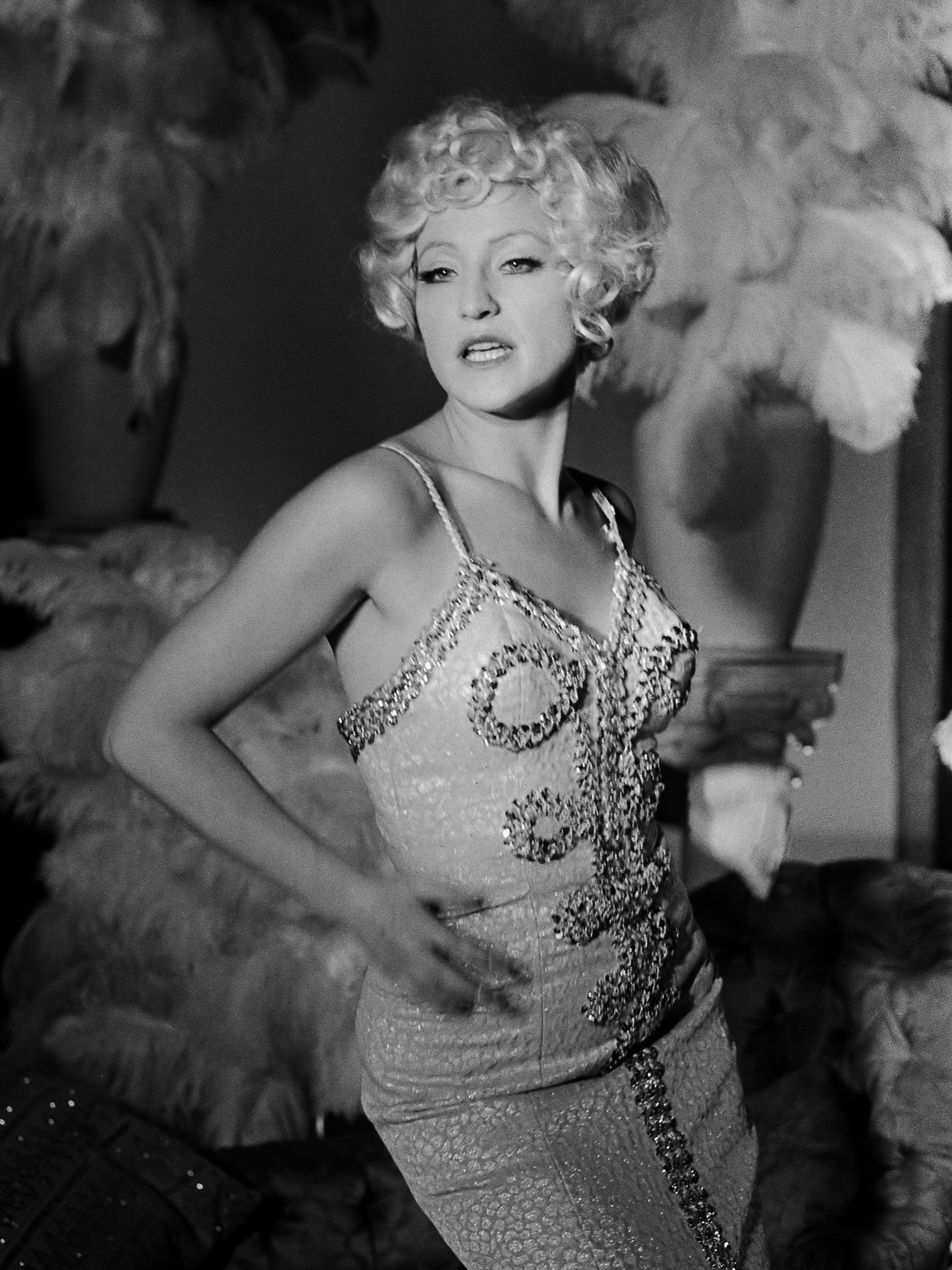 TV: Jasperina Show , Jasparina de Jong in scene 17 november 1971